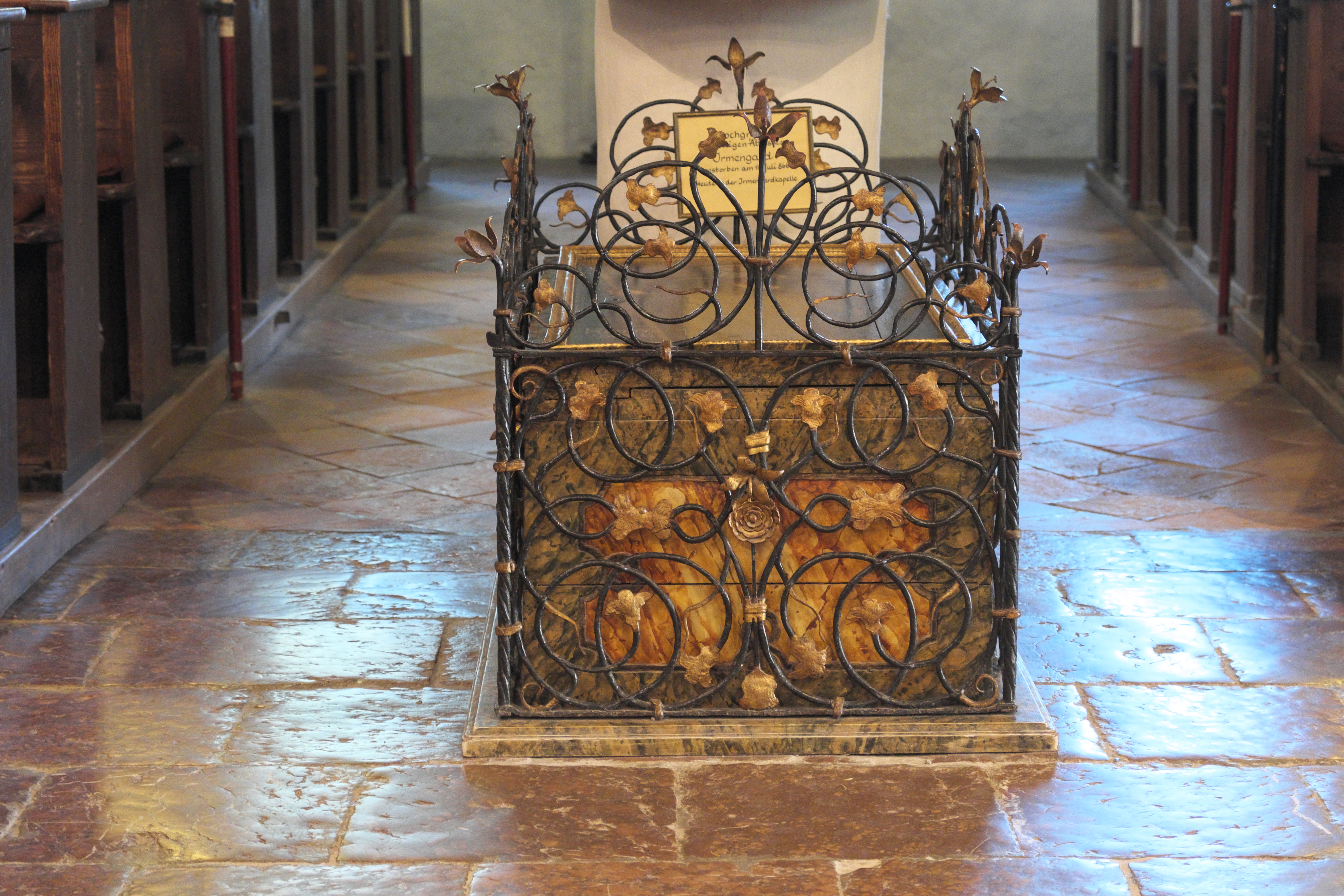 Katholische Abtei- und Kuratiekirche Mariä Opferung des Benediktinerinnenklosters Frauenchiemsee auf der Fraueninsel im Landkreis Rosenheim (Bayern/Deutschland), Hochgrab der seligen Irmgard von Chiemsee